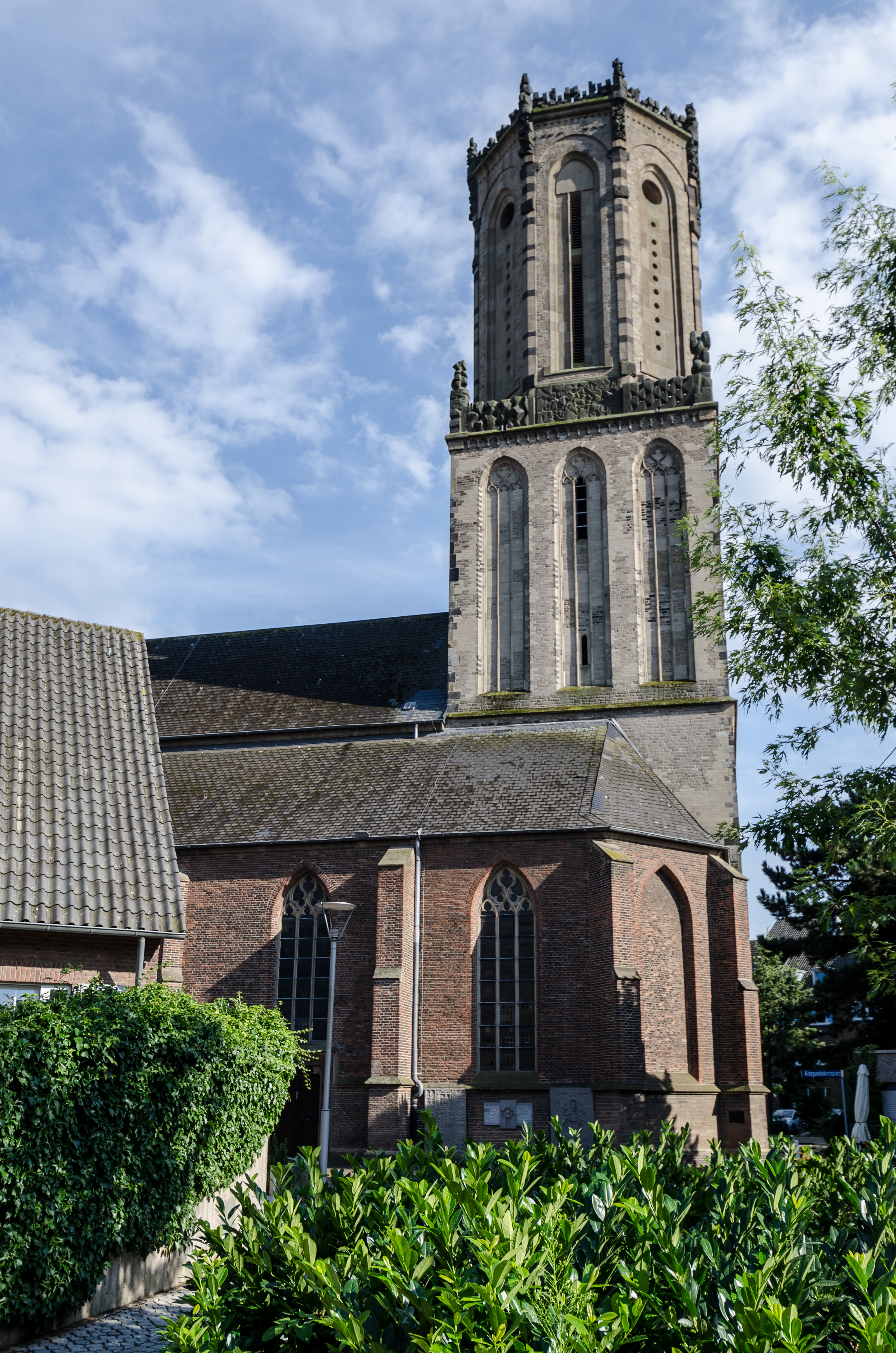 Aldegundiskirche in Emmerich am Rhein